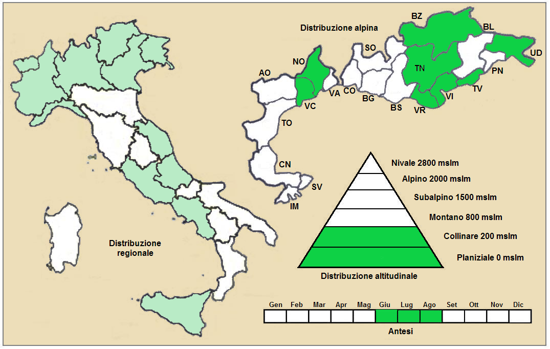 Bromus catharticus - Distribuzione in Italia